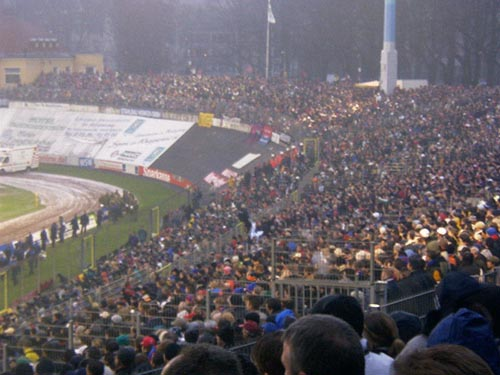 (Original text: Ein Bild der vollen Ränge im Stadion am Zoo im Januar 2004 beim Freundschaftsspiel gegen Bayern München (3:5). Die Werbebanner verdecken die alte Radrennbahn. Auch zu erkennen die alte Stadiongastätte.)